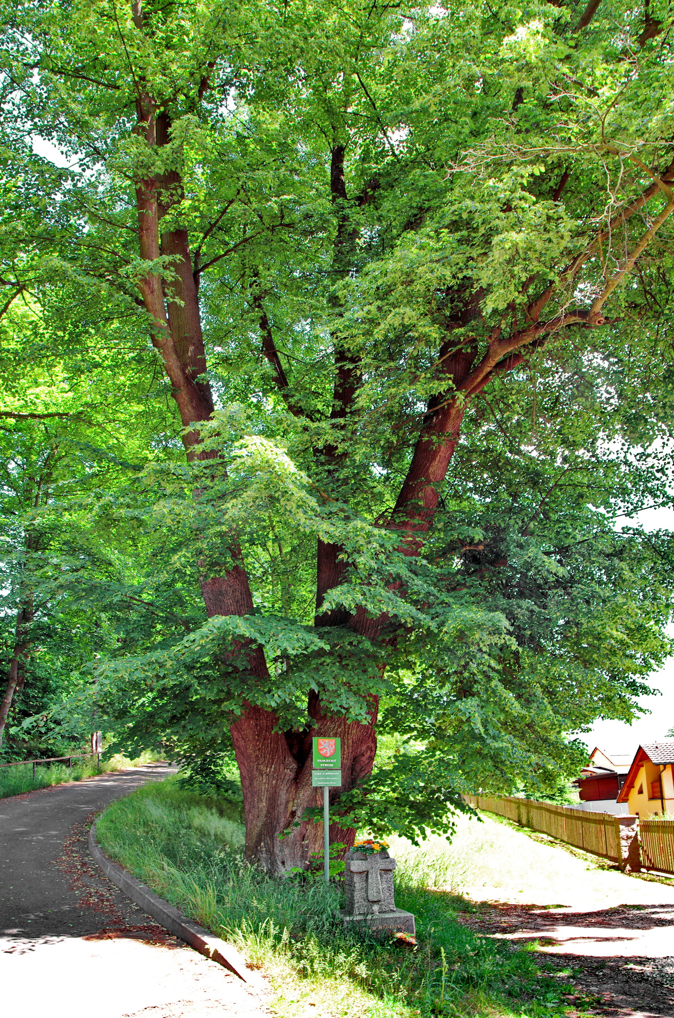 Památný strom Lípa u hřbitova, Nová Role, okres Karlovy Vary